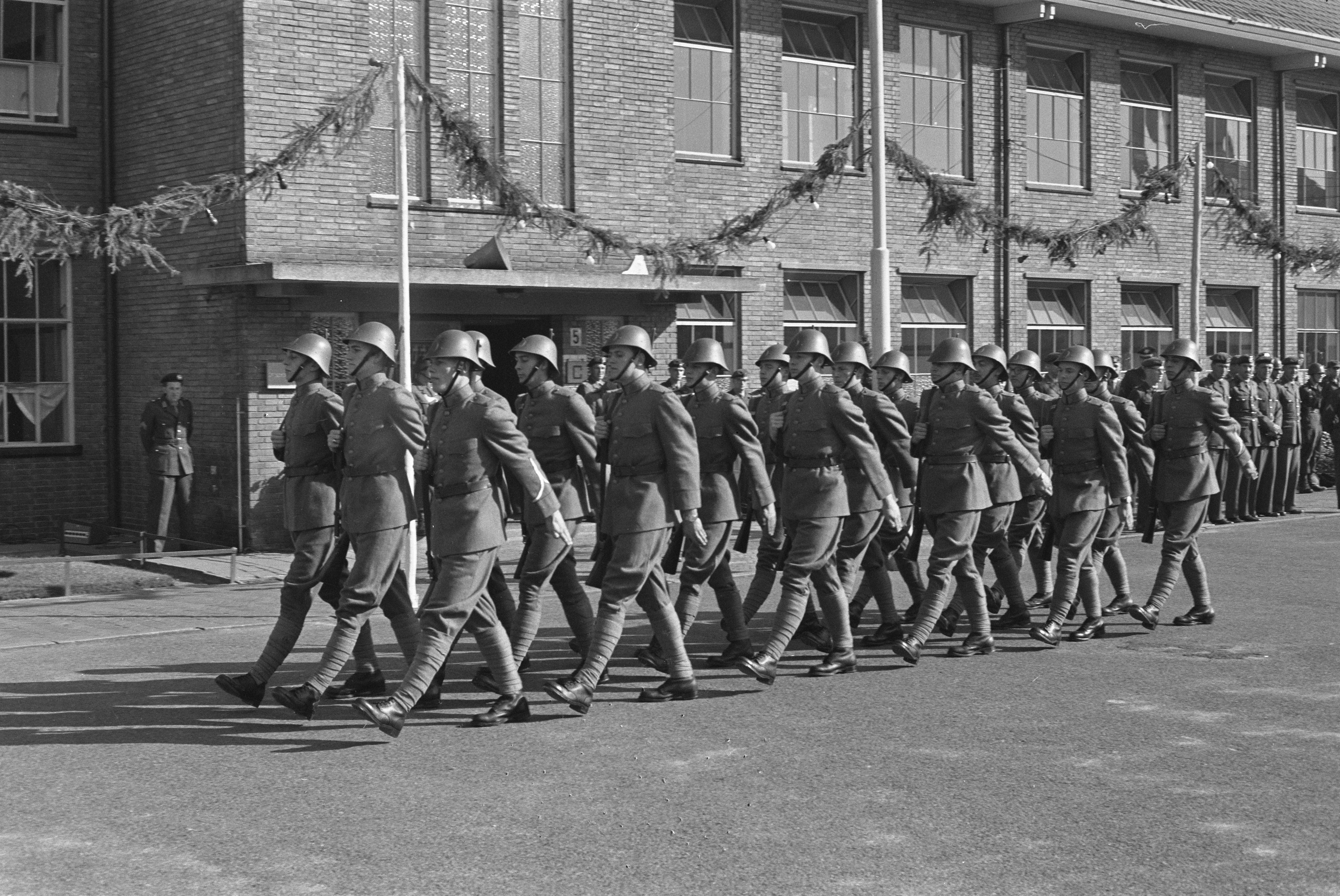 Collectie / Archief : Fotocollectie Anefo Reportage / Serie : [ onbekend ] Beschrijving : 50-jarig bestaan ROS Ermelo, demonstraties oude en nieuwe uniformen Datum : 30 september 1959 Locatie : Ermelo Trefwoorden : DEMONSTRATIES, uniformen Fotograaf : Sterling, […] / Anefo Auteursrechthebbende : Nationaal Archief Materiaalsoort : Negatief (zwart/wit) Nummer archiefinventaris : bekijk toegang 2.24.01.05 Bestanddeelnummer : 910-7157